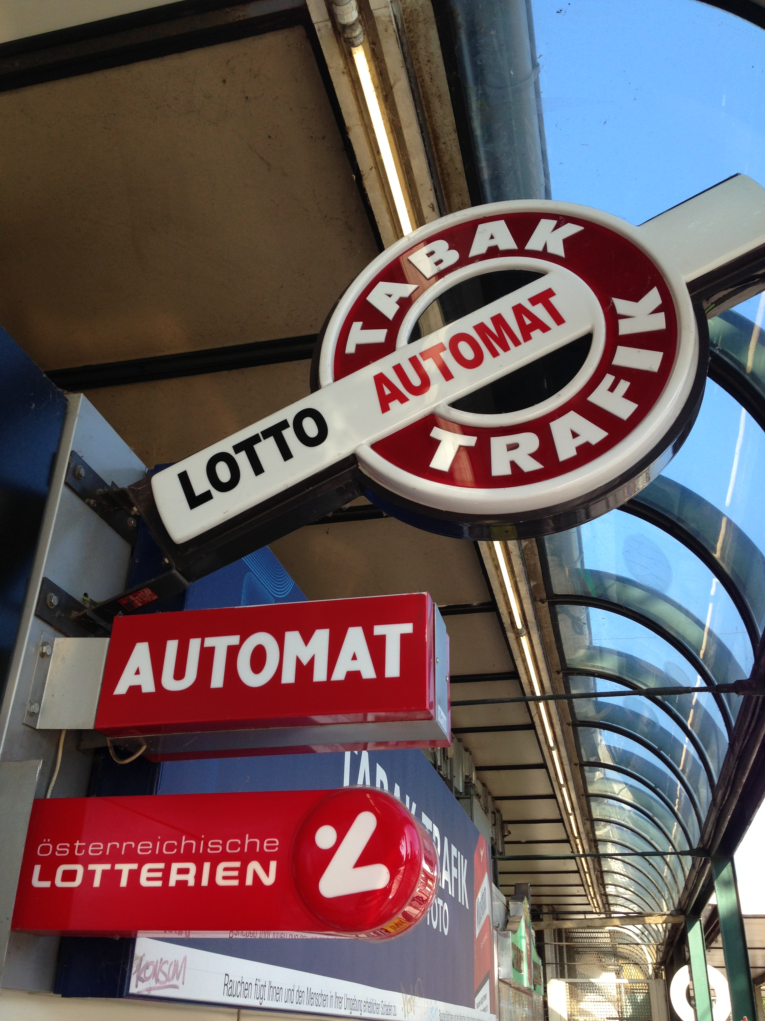 Trafik am Schwedenplatz